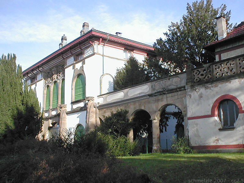 Villa Schliz, Jugendstilvilla für Stadtarzt Schliz in der Alexanderstraße 53 in Heilbronn